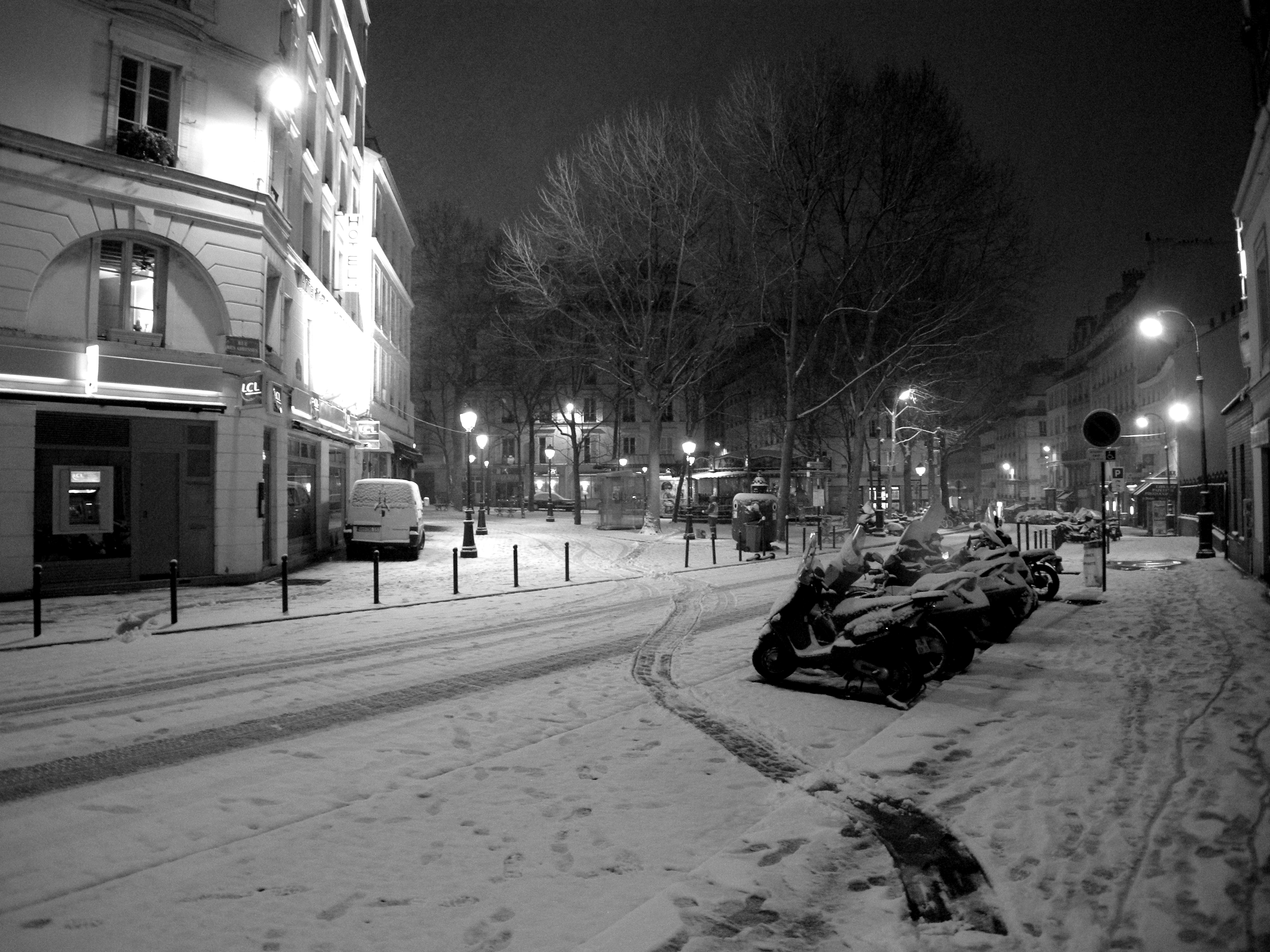 Place des Abbesses depuis la rue des Abbesses, Paris XVIIIe, France